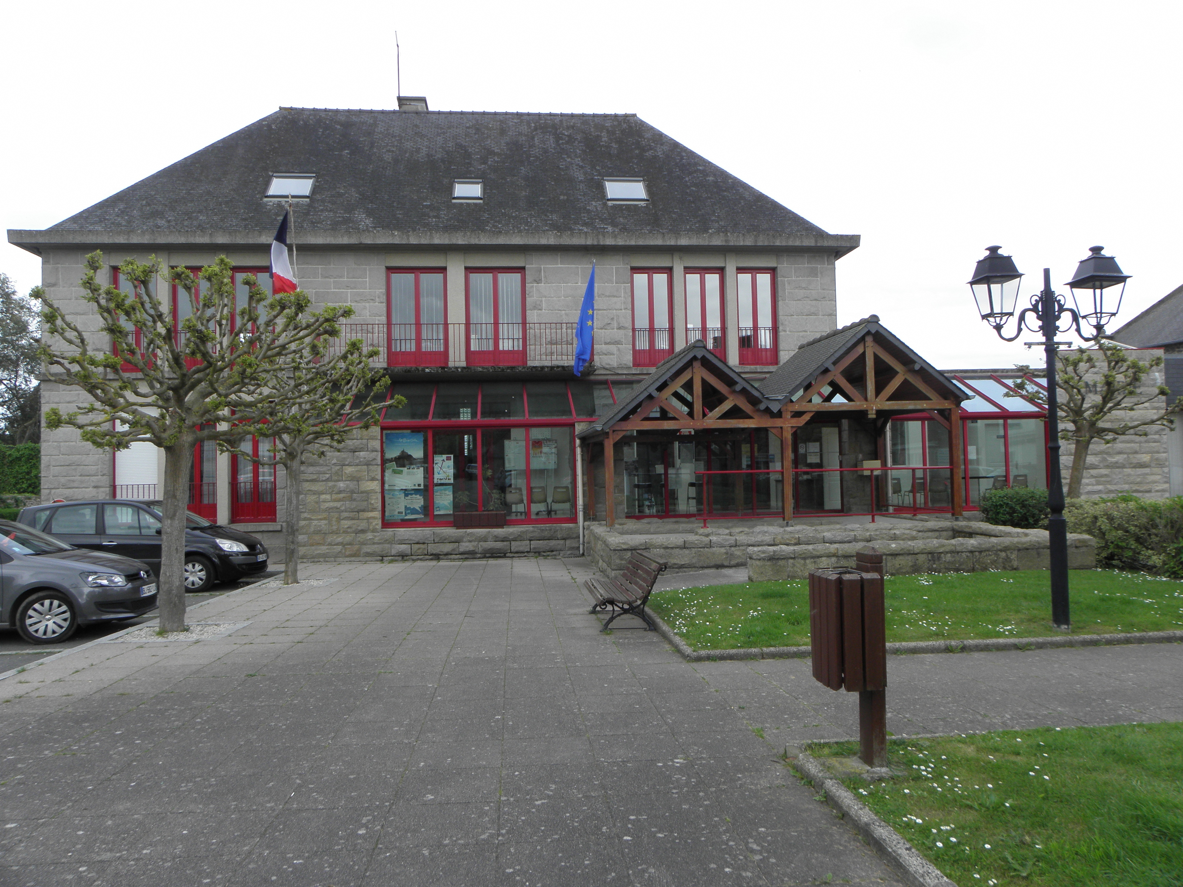 Mairie de Miniac-Morvan (35).